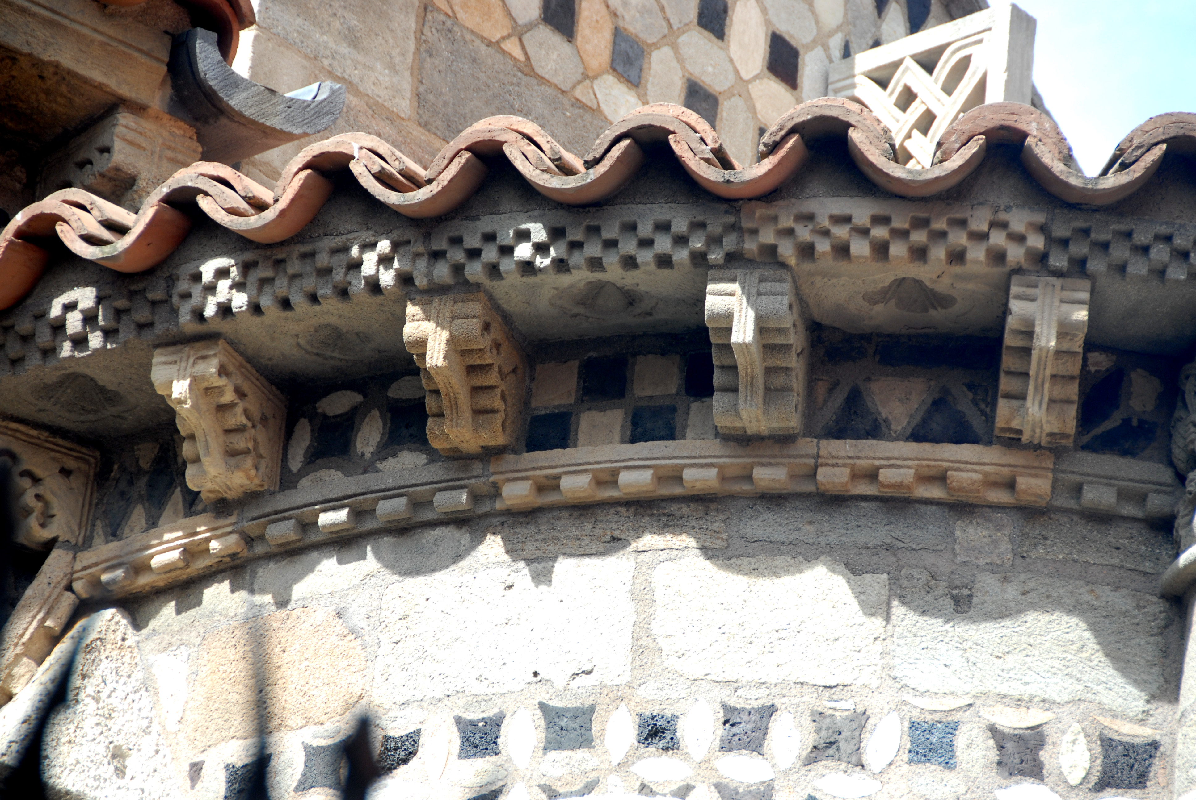 Notre-Dame du Port, Detail Kapellentraufe, Hobelspan- Kragsteine